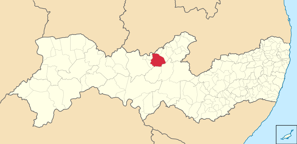 Mapa de Flores (2)